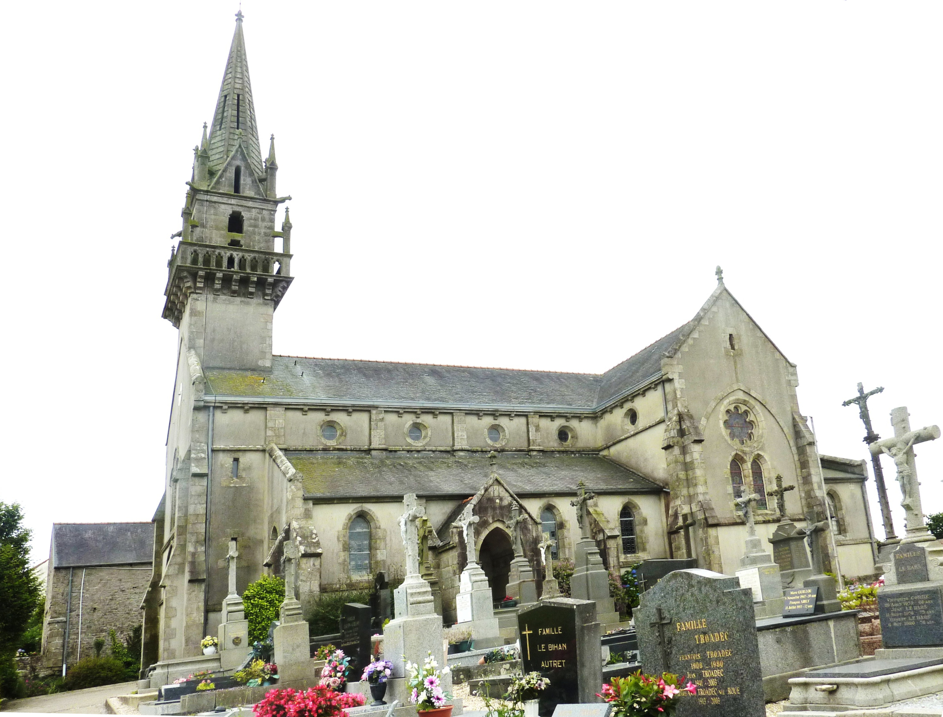 Saint-Thonan : l'église paroissiale